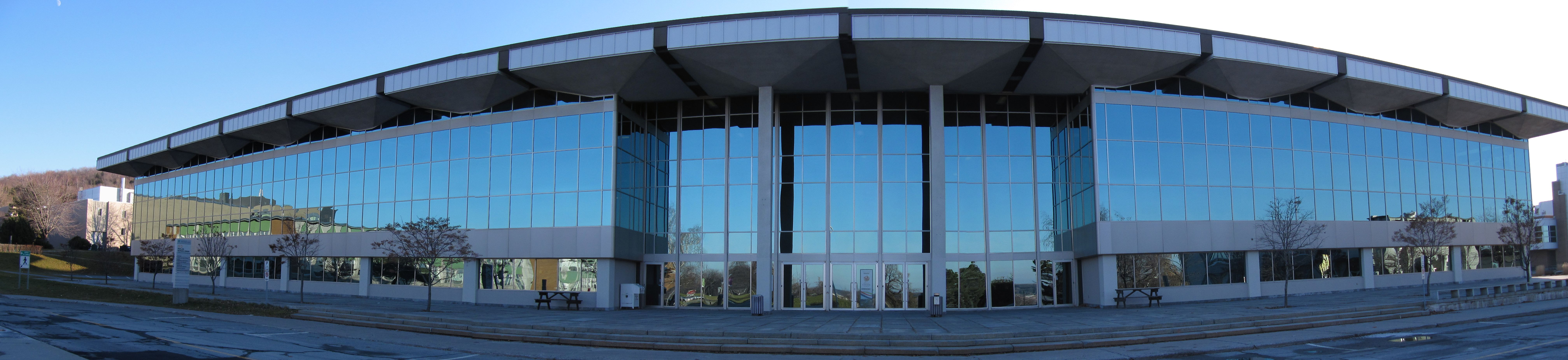 Pavillon Georges-Cabana de l'Université de Sherbrooke. On y retrouve la bibliothèque Roger-Maltais et le Carrefour de l'information.